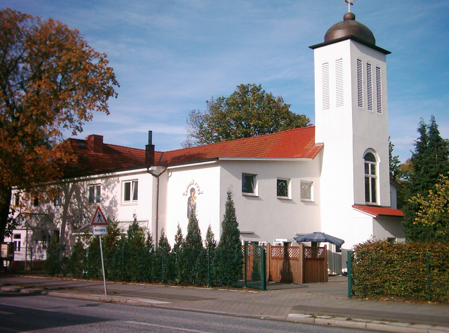 St. Dimet, Syrisch-Orthodoxe Kirche von Antiochien. Neugraben, Hamburg.